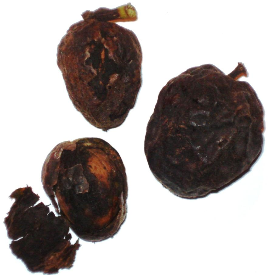 Juglans Regia infested with Rhagoletis completa